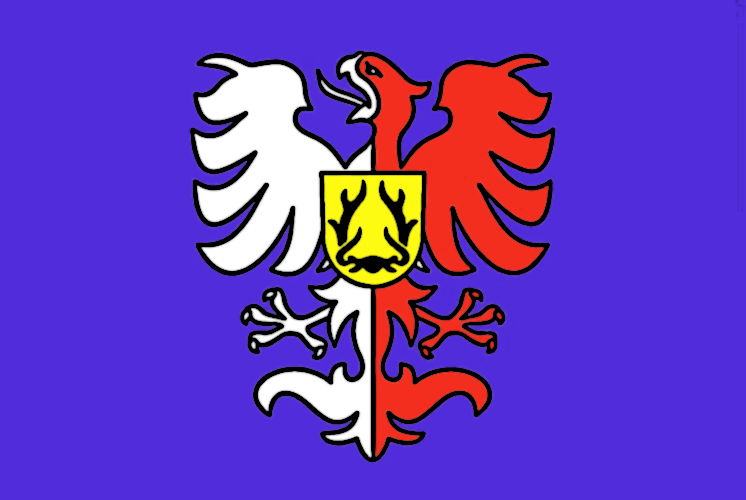 Vlajka obce Vrchotovy Janovice